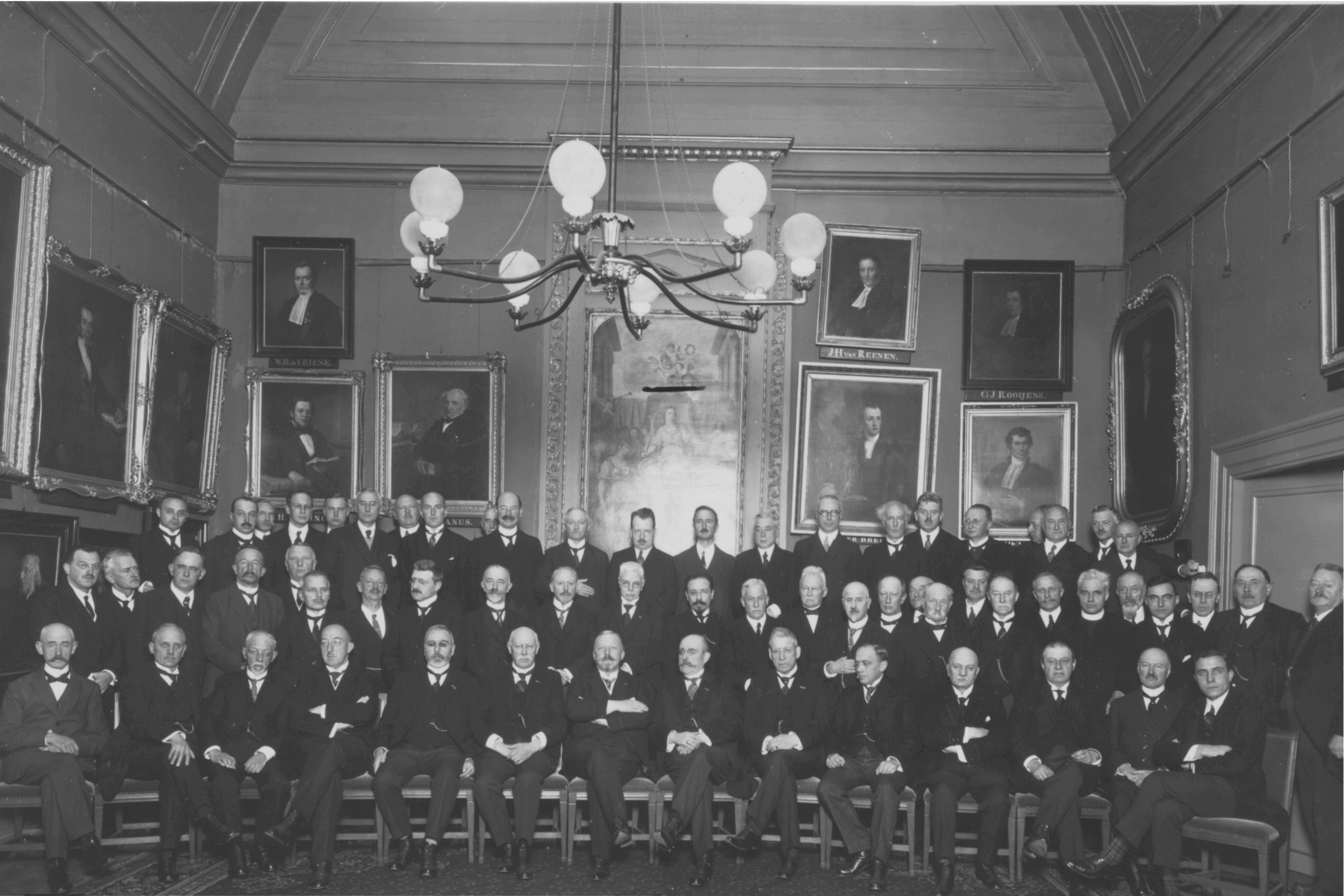 Opening van het nieuwe pand van de Universiteit van Amsterdam aan de Kloveniersburgwal ('de schaats'), in tegenwoordigheid van burgemeester Willem de Vlugt, die evenals rector-magnificus prof. Hajo Brugmans een rede hield. 1ste rij (vlnr) Willem de Vries, Hendrik Burger, Johannes de Meijere, Scholte (secretaris), curatoren Kruseman en Romme, burgemeester De Vlugt, Hajo Brugmans (rector-magnificus), curator Constant Delprat, wethouder Ed. Polak, Roovers (gemeentesecretaris), Heimans, Arnold Holleman, mr. Idenburg; 2de rij (vlnr) Lacqueur, Schnüttner, Adriaan Aten, Hondius Boldingh, Johan van Eerde, H.K. Bouman, Wevers, van Bakel, Swaen, Smits, Pieter Zeeman (* 25. Mai 1865 in Zonnemaire; † 9. Oktober 1943 in Amsterdam), Jehuda Palache, Jean-Jacques Salverda de Grave, Jacob Rotgans, Mendes da Costa, Richard C. Boer, Prinsen, Diederik Korteweg, Roland W. Weitzenböck, Remmelt Sissingh, Pieter Ruitinga, Reinier Welschen, Anton Pannekoek, van Apeldoorn (??), Johan Ihle, Willem Kühler, van Pommeren (pedel); 3e rij (vlnr): Gerard Heringa, David van Embden, Johannes Diderik van der Waals jr. ('s Gravenhage, 7 augustus 1873 - Amsterdam, 8 mei 1971), Wolter Kuiper, de Groot, Nicolaas Posthumus, van Dijk, Pieter Losecaat Vermeer, de Boer, Pieter van der Wielen, Lambertus J. Apeldoorn (??), Geerto Snijder, Nicolaas Swellengrebel, Philip Kleintjes, Roelof Kranenburg, Frederik (F.A.) Stoett, Bernardus Brouwer, van Rooy, Gerard Abraham van Rijnberk, Eugène Dubois (* 28. Januar 1858 in Eijsden; † 16. Dezember 1940 in Haelen), Theodoor Jan Stomps, Gerrit Mannoury. De opname is gemaakt in de senaatskamer in het Oudemanhuispoortcomplex.